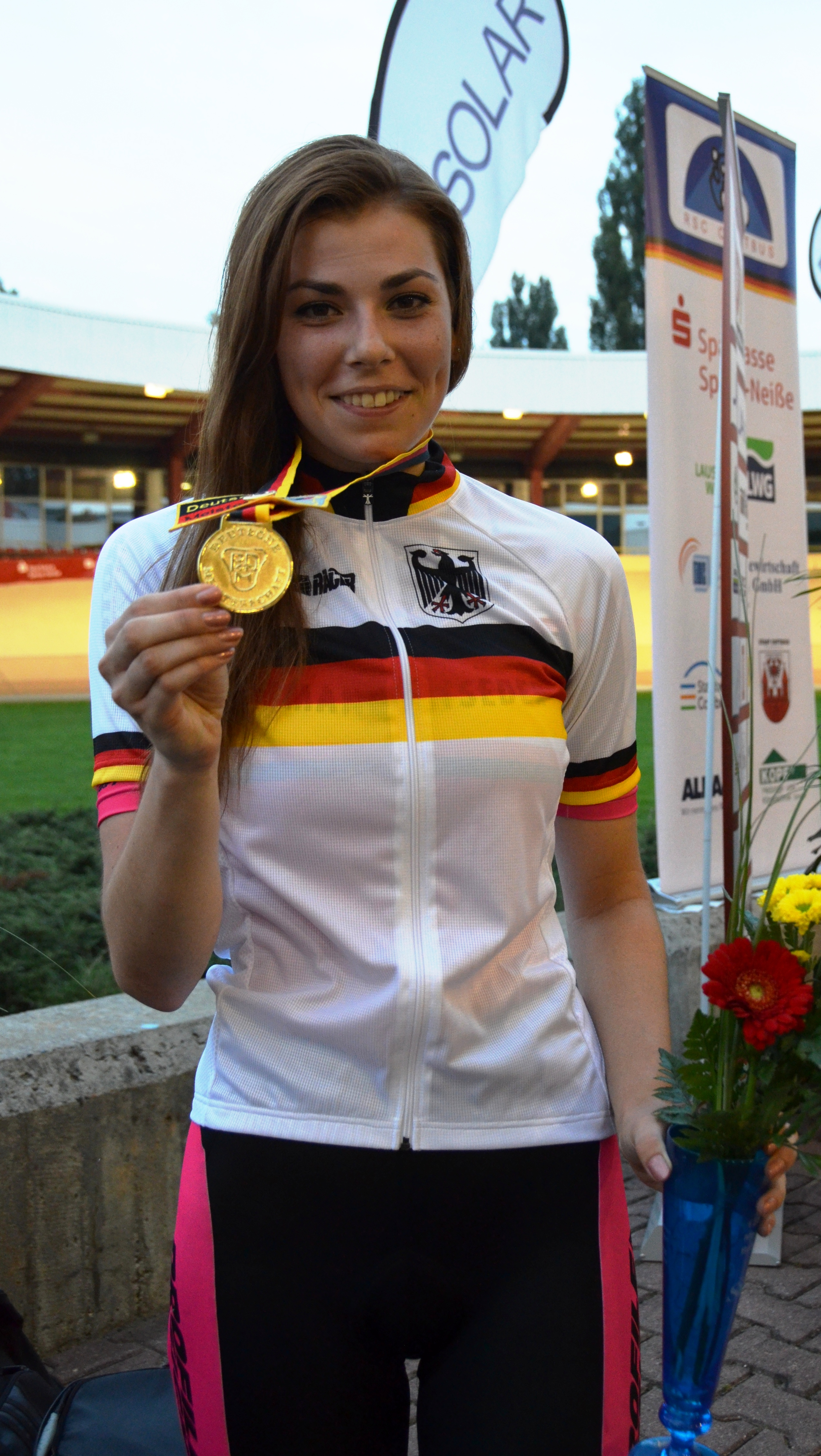 The making of this document was supported by the Community-Budget of Wikimedia Germany. Laura Süßemilch, deutsche Radsportlerin